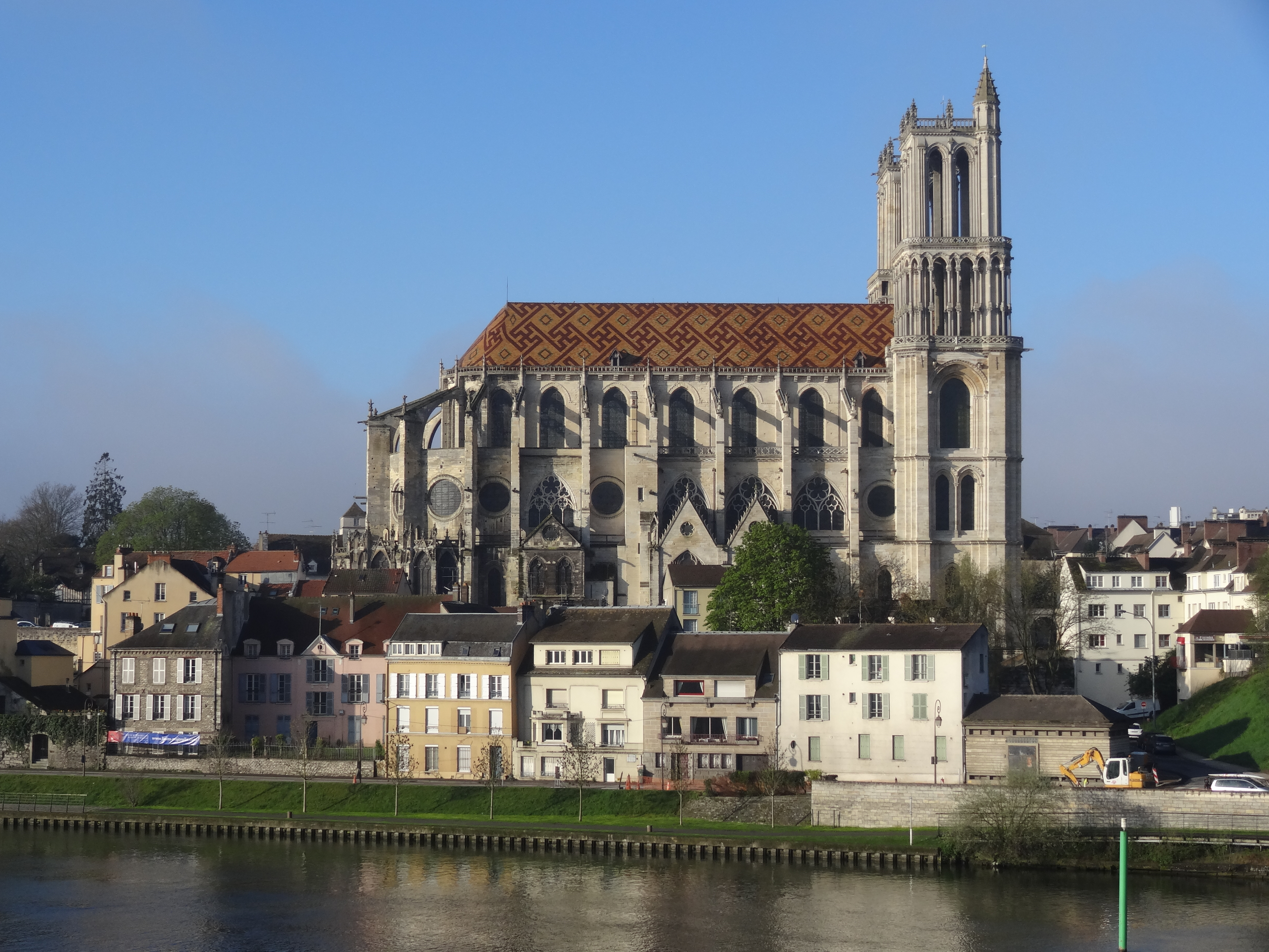 Collégiale Notre-Dame de Mantes-la-Jolie - voir titre.